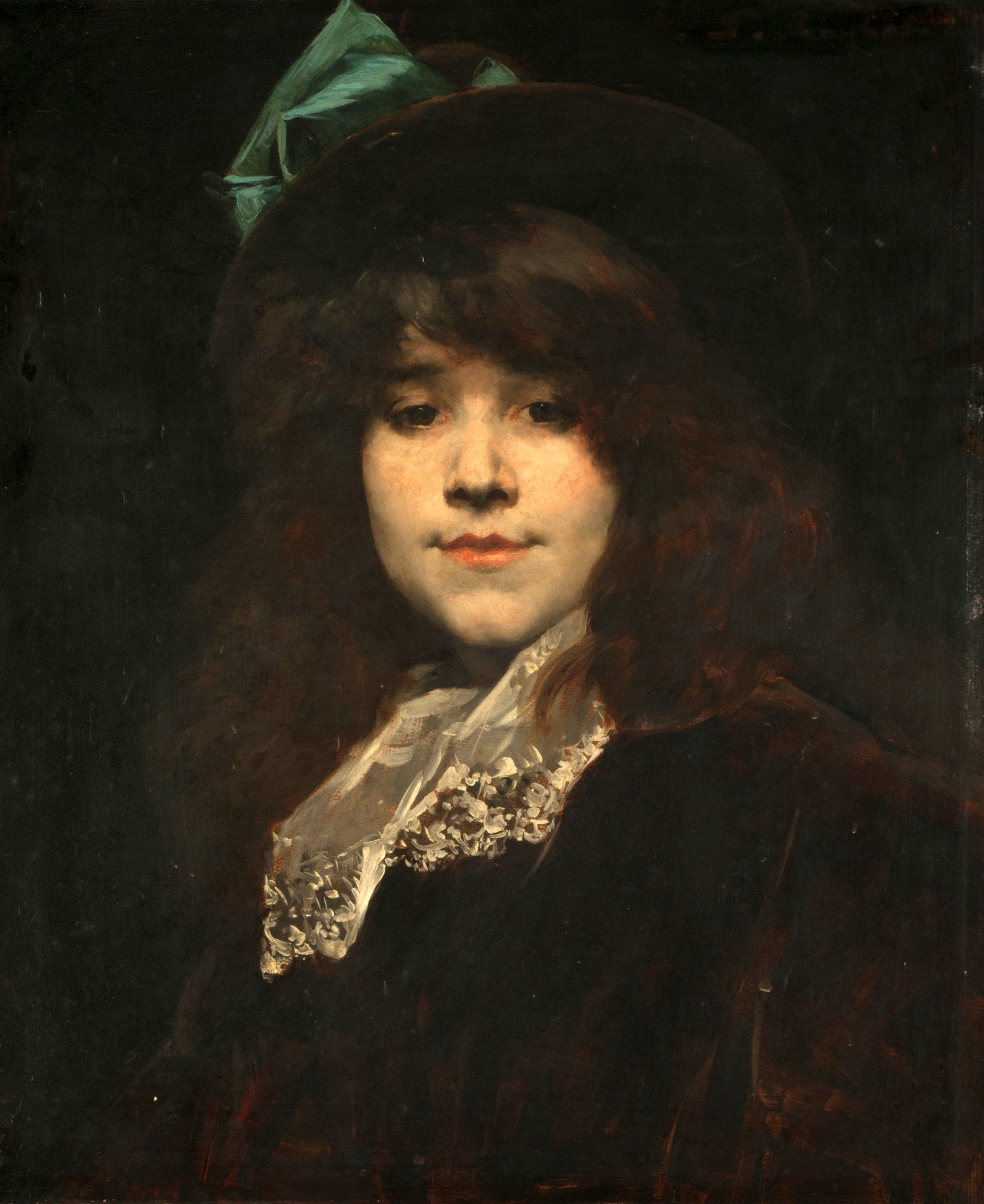 Ferdinand Roybet, Portrait de Juana Romani (Retrato de Juana Romani). Ca.1890. 55 x 45,5 cm, con marco: 81 x 71,5 x 9 x 12,5 cm, óleo sobre tabla. Inv. 5898.